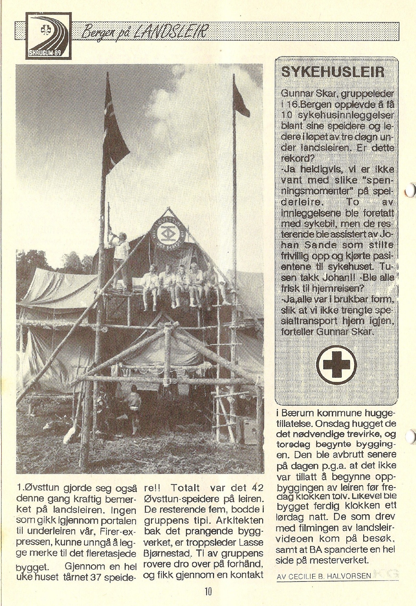 Kretsens Gang nr. 5 i 1989 forteller om bygget med flere etasjer som ble laget på landsleiren på Skaugum i 1989. Bilder på er lisensiert under Creative Commons Attribution 3.0 Unported-lisens